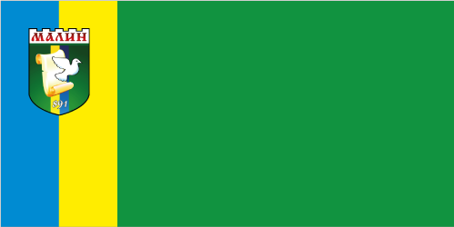 прапор м. Малин